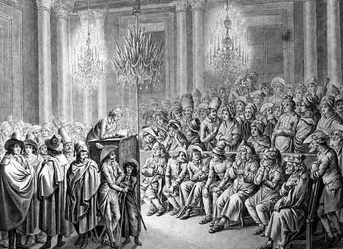 Versammlung des Mainzer Jakobinerclubs im ehemaligen kurfürstlichen Schloss. Friedrich Georg Pape trug seine Thesen zum Verhältnis der französischen Verfassung zur katholischen Kirche dort am 25. November 1792 vor. Lavierte Federzeichnung, 44,3x57,9cm, Mainz, Landesmuseum Mainz